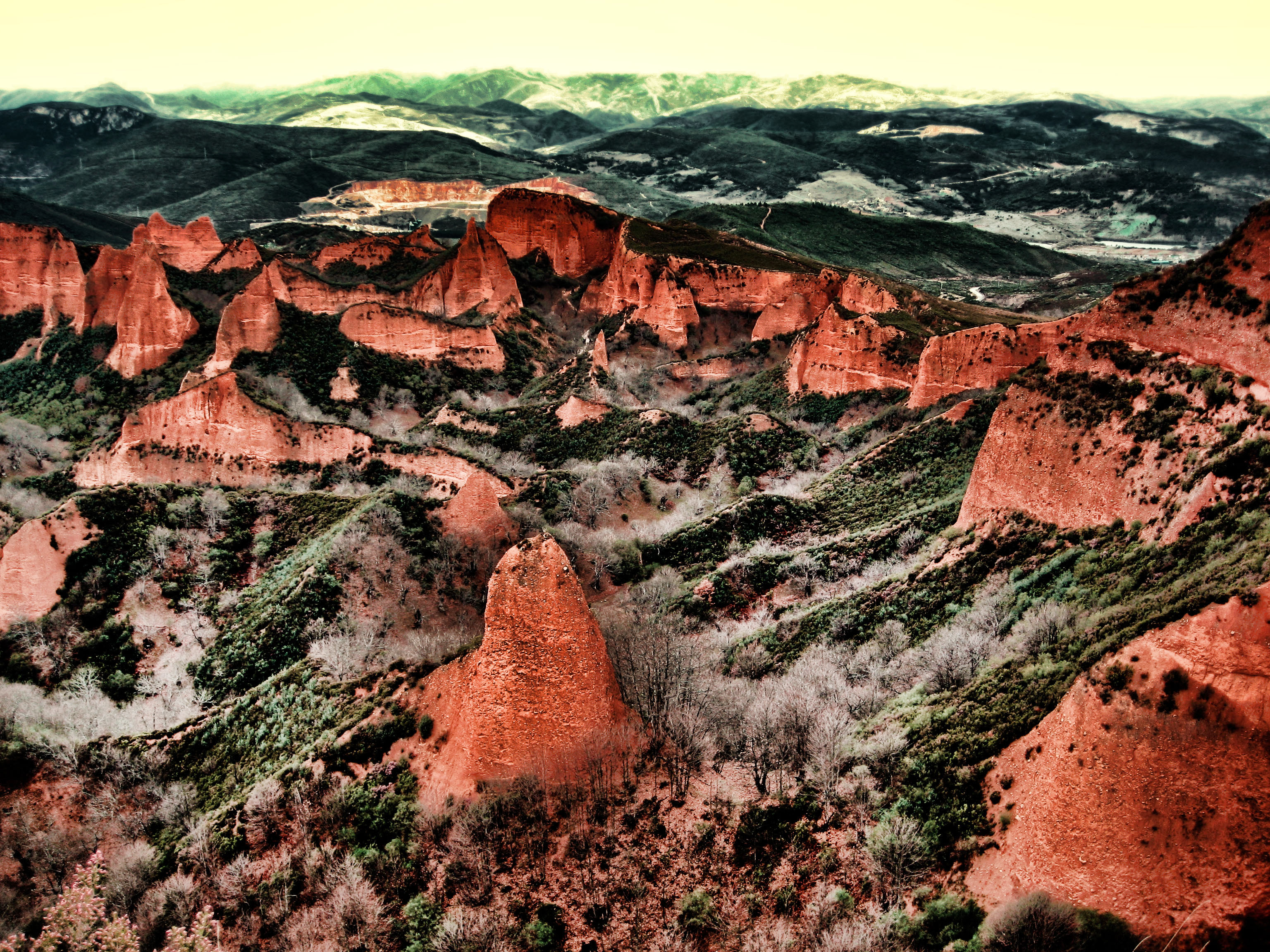 As Medulas, Carucedo, León